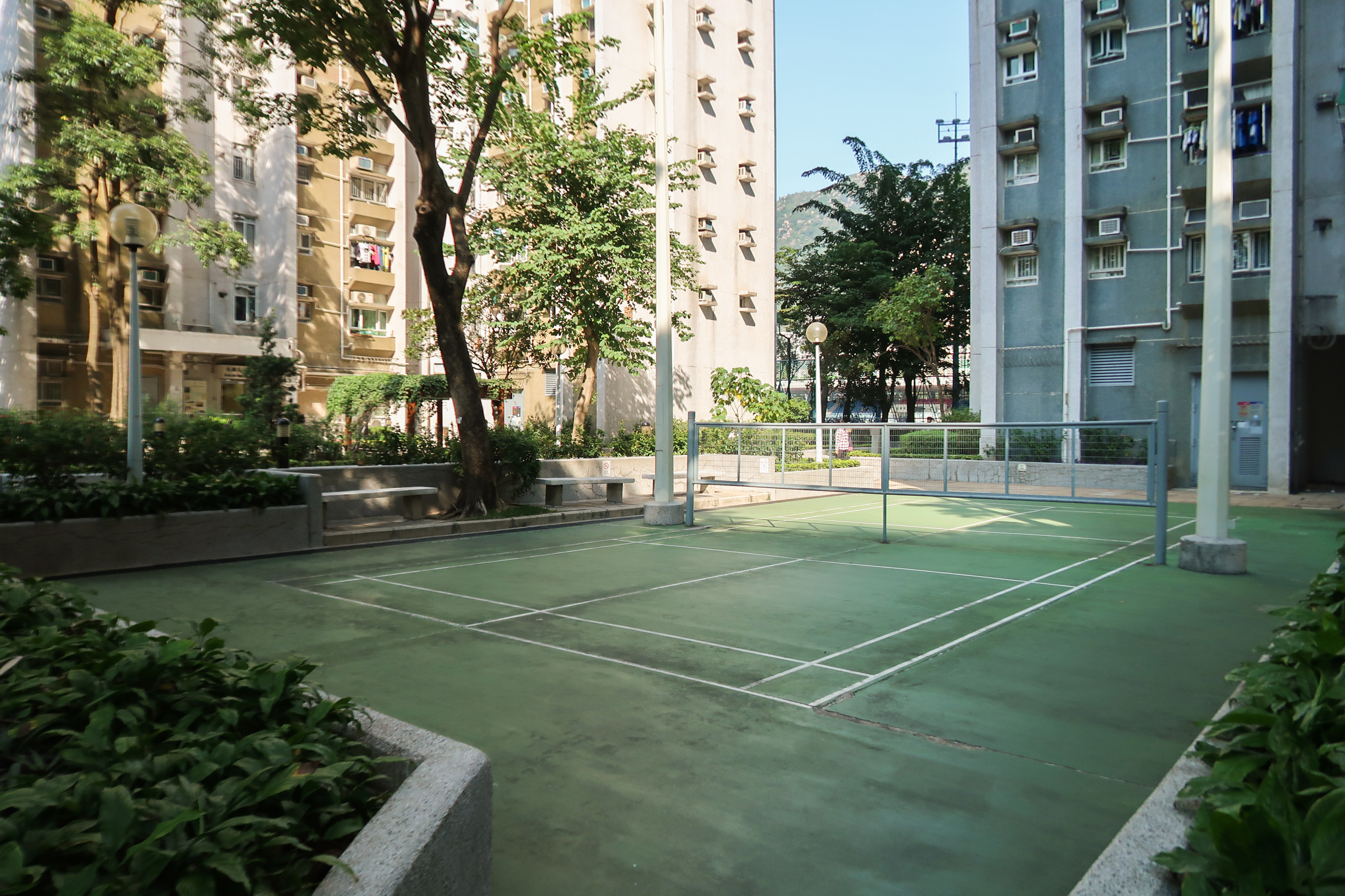 Siu Lun Court Badmintin Court